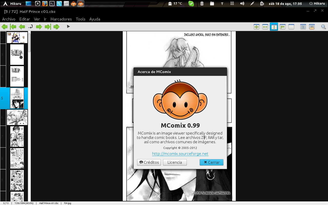 MComix corriendo en Archlinux en el entorno Gnome-Shell